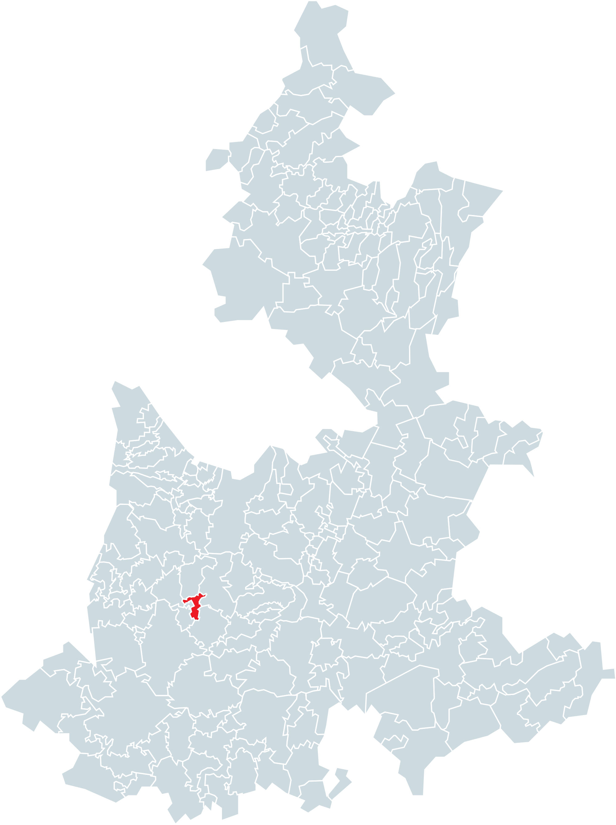 Municipio de Xochiltepec